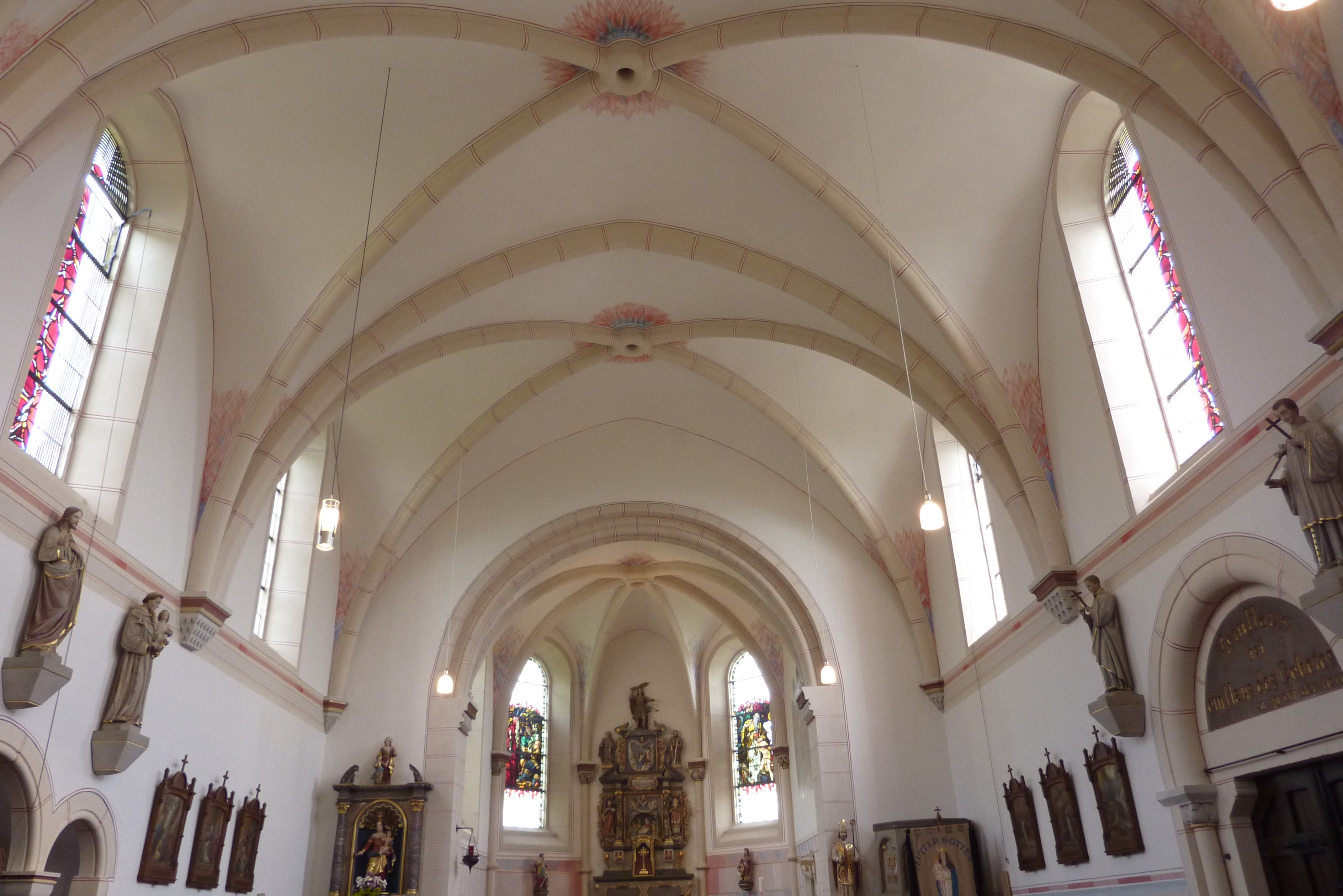 katholische Pfarrkirche St. Dionysius in Kirchwald, Innenansicht